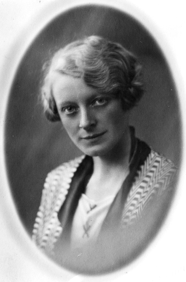 portrett, kvinne, brystbilde.